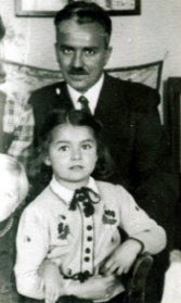 Forgács Ferenc, az Állami lakótelep telep gondnoka. Pestszentlőrinc